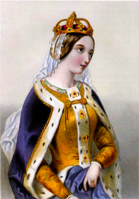 Catherine de Valois, reine consort d'Angleterre